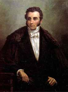 Portrait of Joaquín Mosquera, 1915. ex President of Colombia